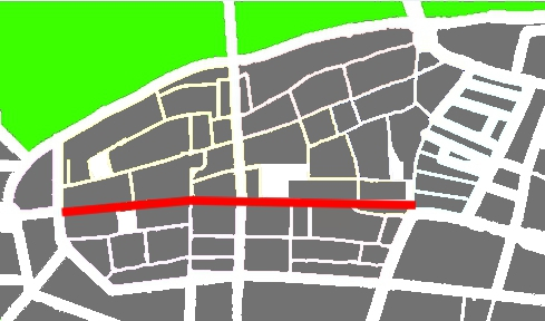 Map with portales street in red